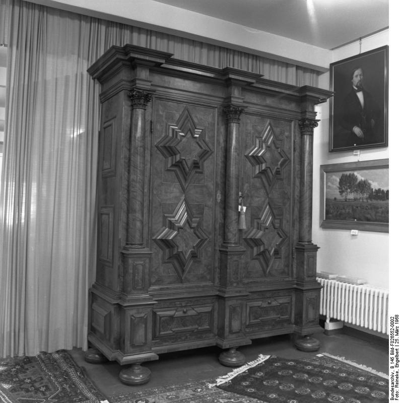 Angebot eines Barockschranks der Fa. Bödiger an Bundeskanzler Kiesinger